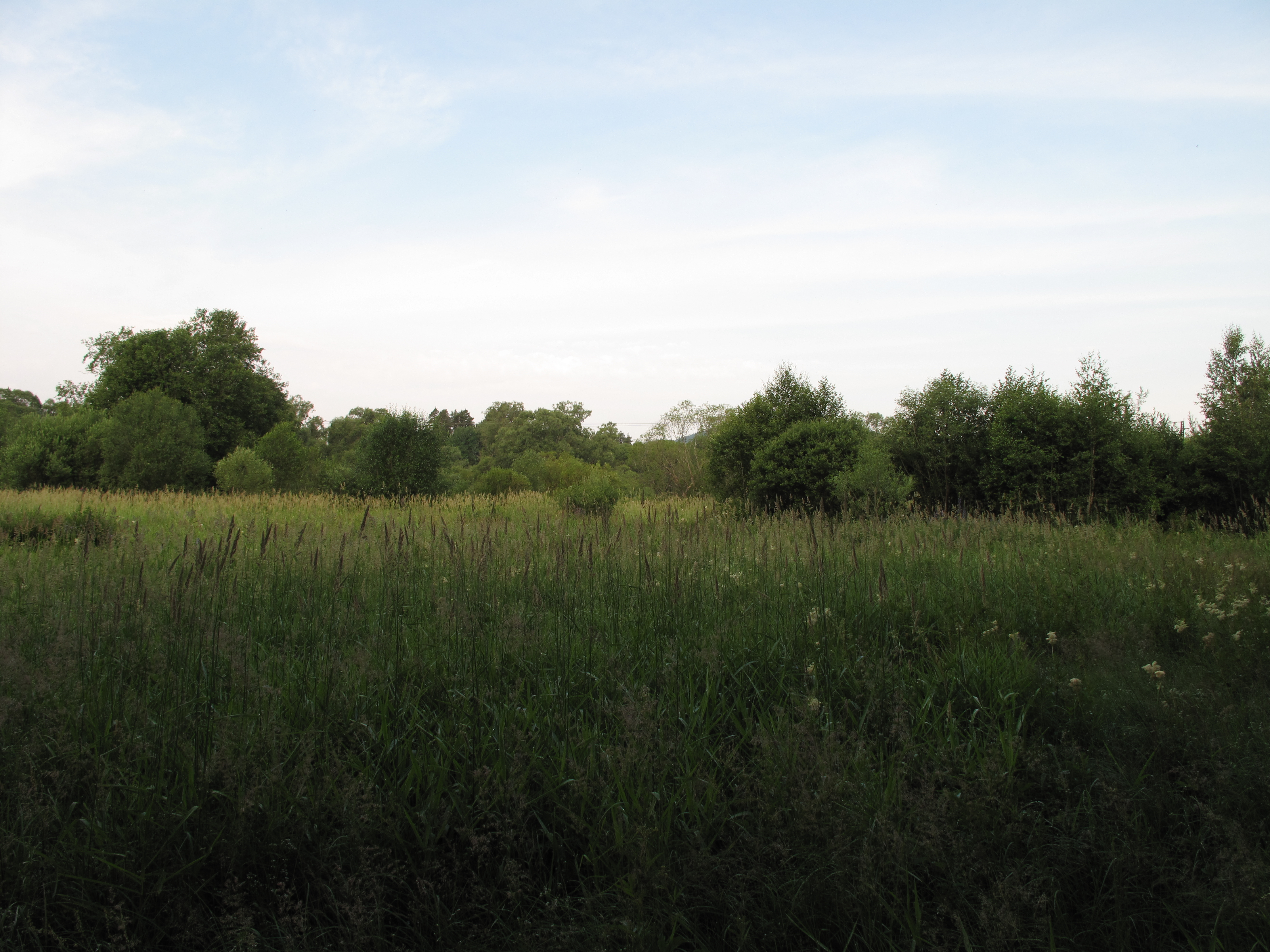 Niva v přírodní památce Malá niva. Okres Prachatice, Česká republika.